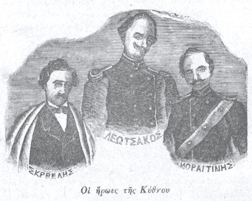 Foto dreier namhafter griechischer Widerstandskämpfer, 19. Jahrhundert.